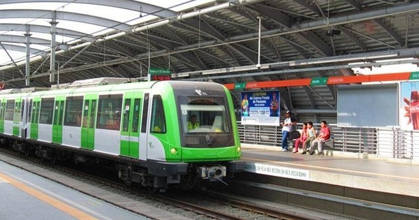 Estacion Atocongo del metro de Lima